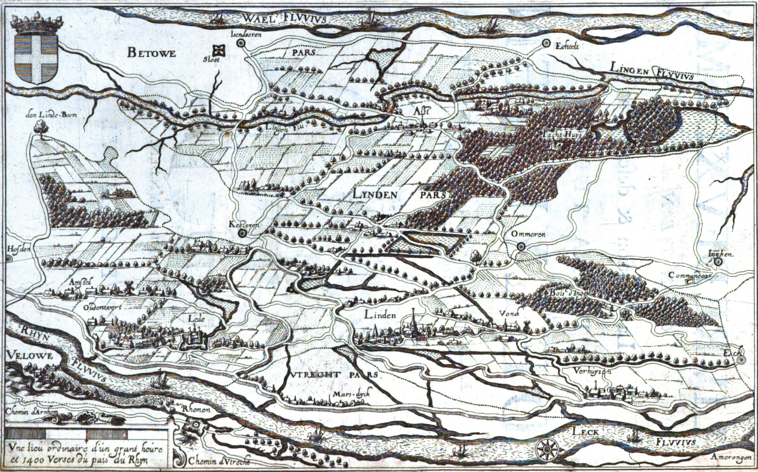 gravure du domaine de Lynden. Annales généalogiques de la Maison de Lynden. Christophe Butkens. Anvers, 1626.